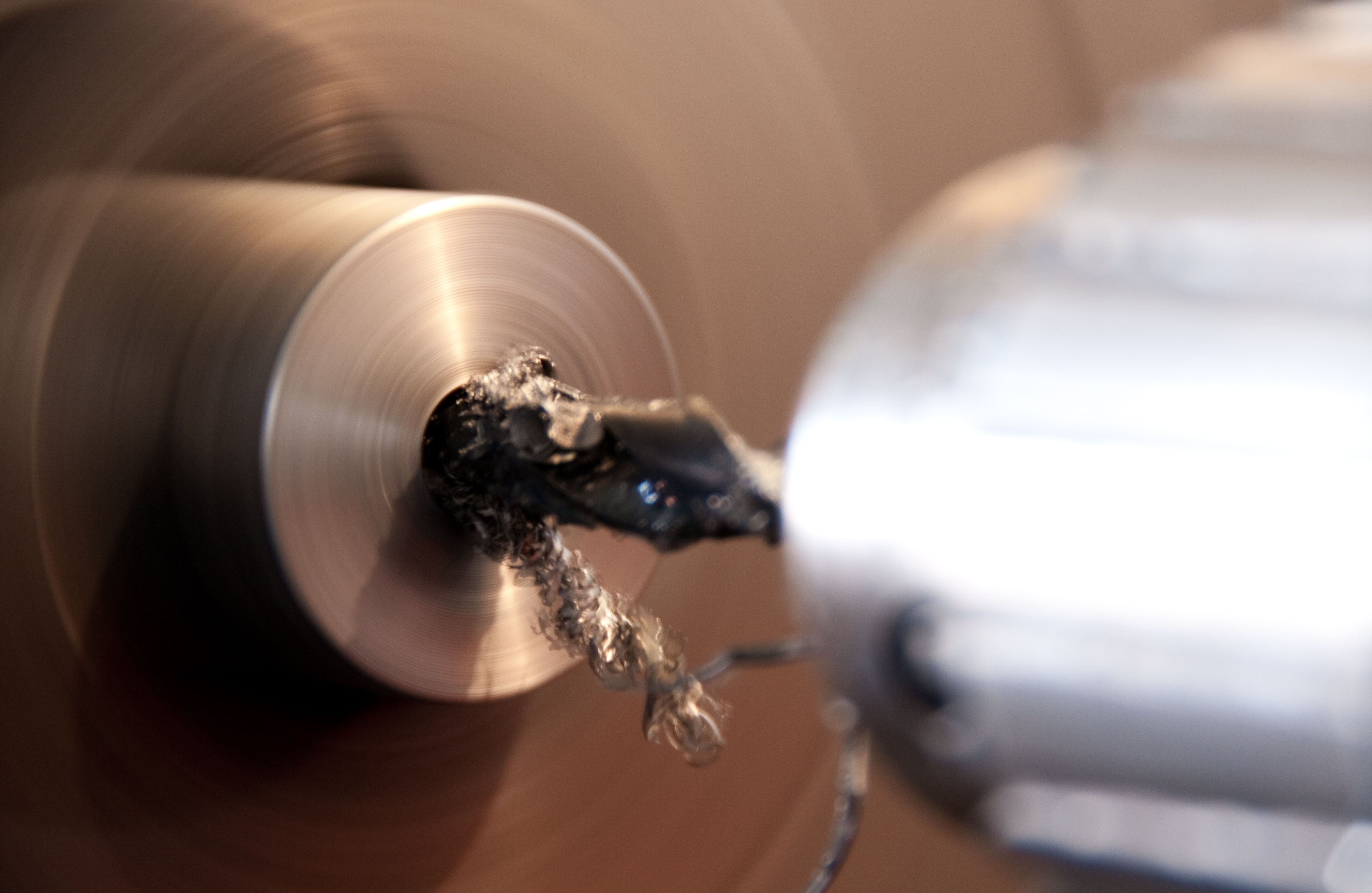 vrtání kovů